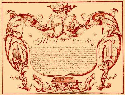 Dedication from Domenico Zipoli's Sonate d’intavolatura